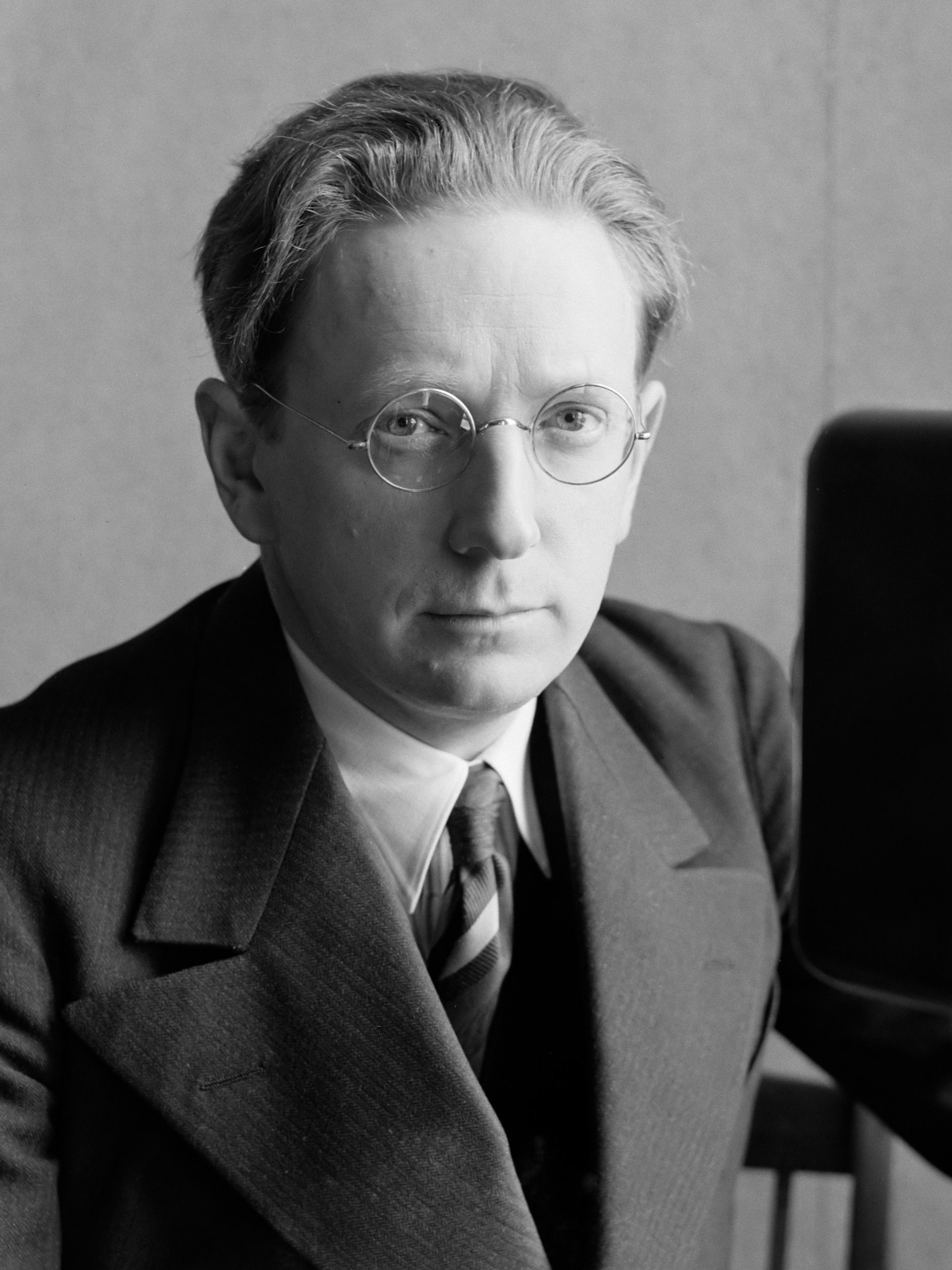 IJslandse componist, musicoloog en dirigent Jón Leifs voor een microfoon 1934